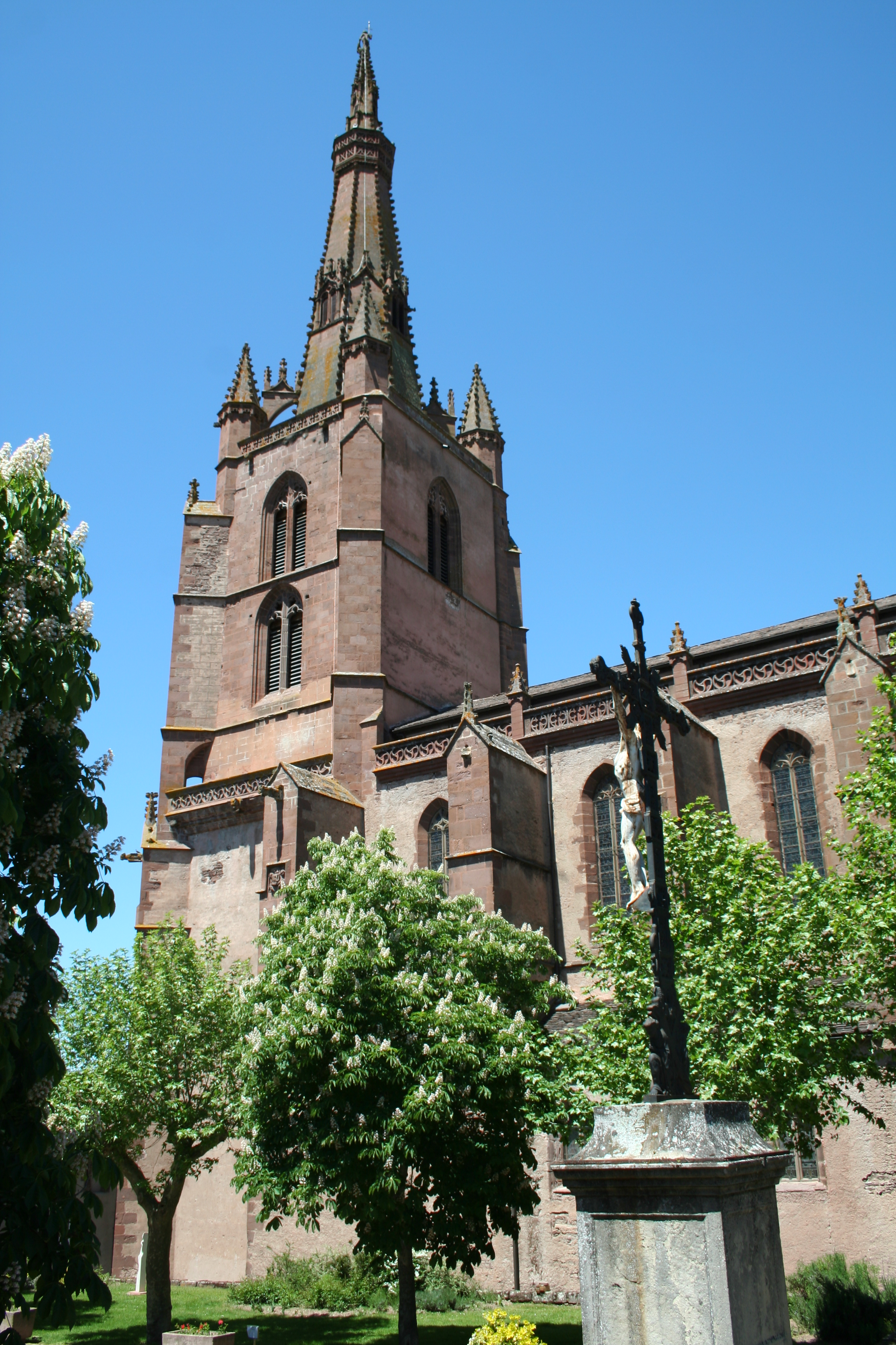 Belmont-sur-Rance (Aveyron) - clocher de la collégiale Notre-Dame-de-l'Assomption et croix.